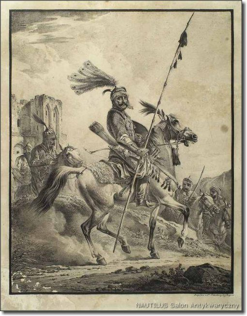 Wódz Kurdów, 1819